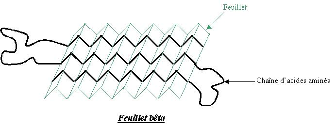 Schéma d'illustration pour la page sur les feuillets bêta. (auteur : pou24)